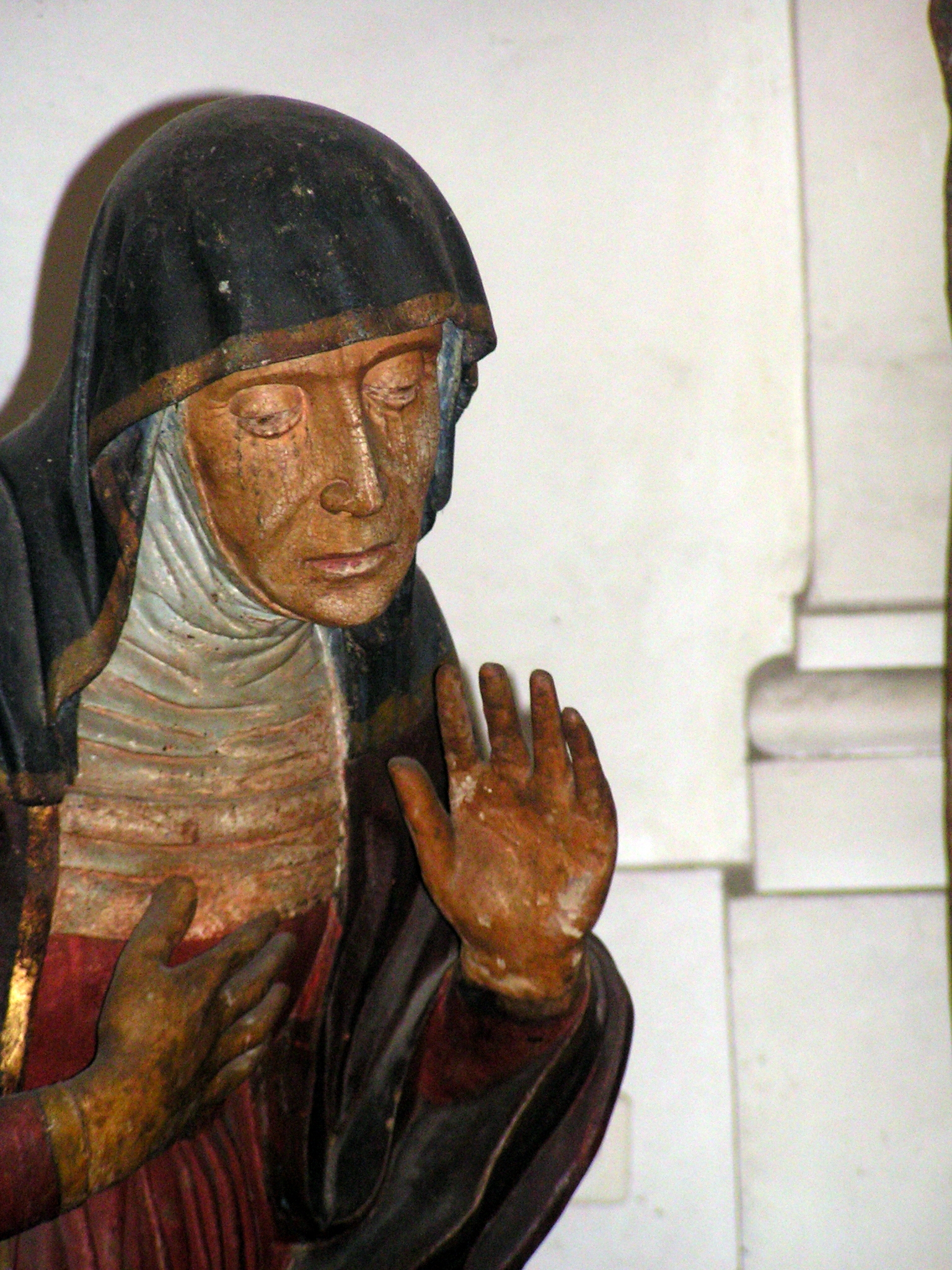 L'altra Maria Compianto presso Santuario della Madonna del Sasso